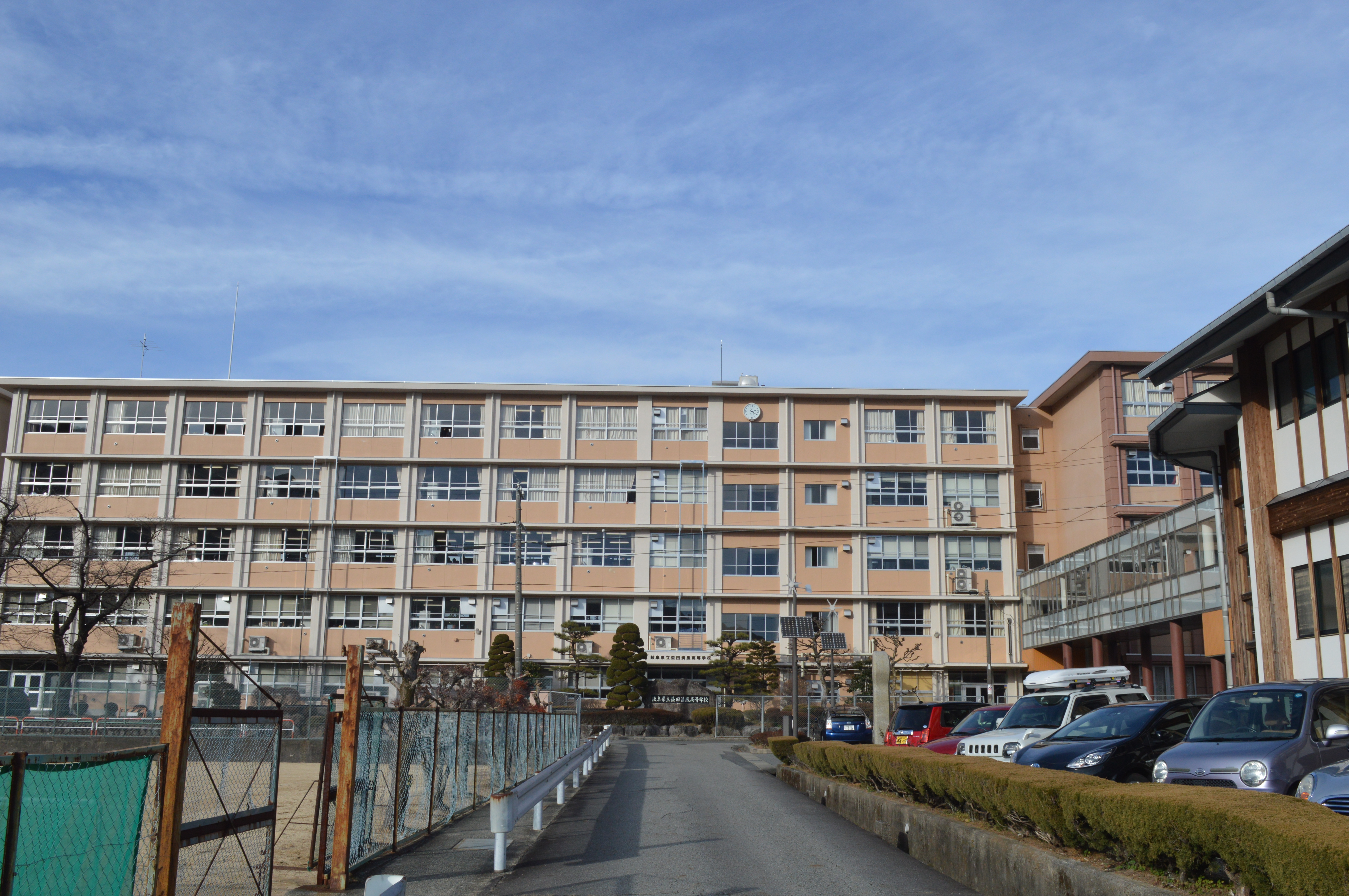 岐阜県立益田清風高等学校（岐阜県立益田清風高校）。岐阜県下呂市。